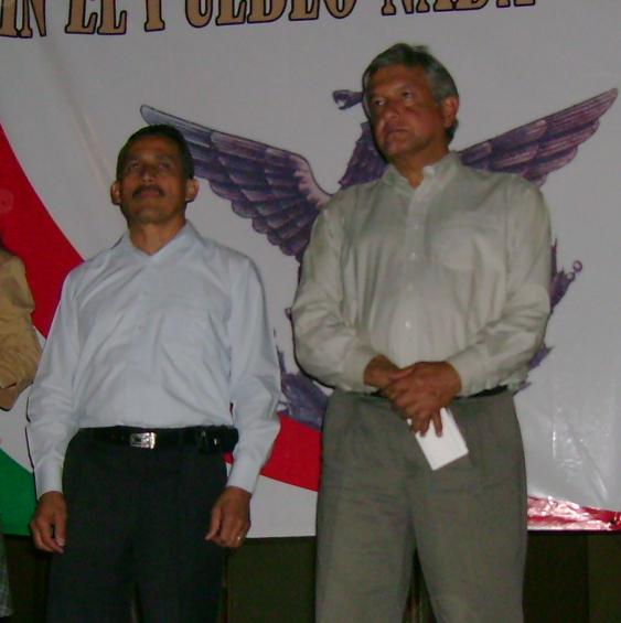 Joel Padilla y Andrés Manuel López Obrador en Villa de Álvarez, Colima